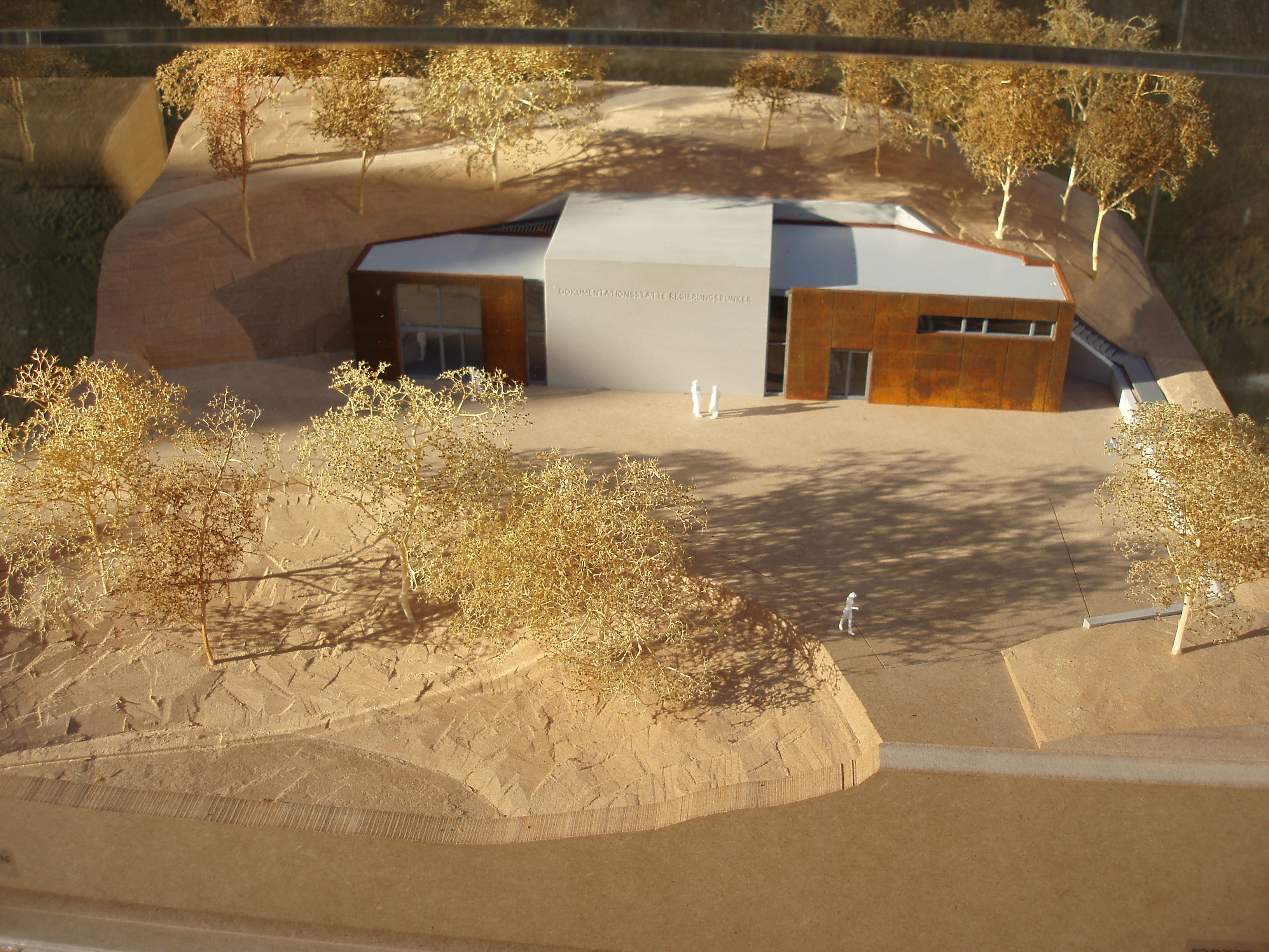 Das Modell zeigt die geplante Außenfassade des Bunkermuseums, zu dem der ehemalige Regierungsbunker im Ahrtal umgewandelt werden soll. Der durch das Ahrtal führende Rotweinwanderweg soll dann umgeleitet werden, so daß er an dem Museumseingang vorbei führen wird.